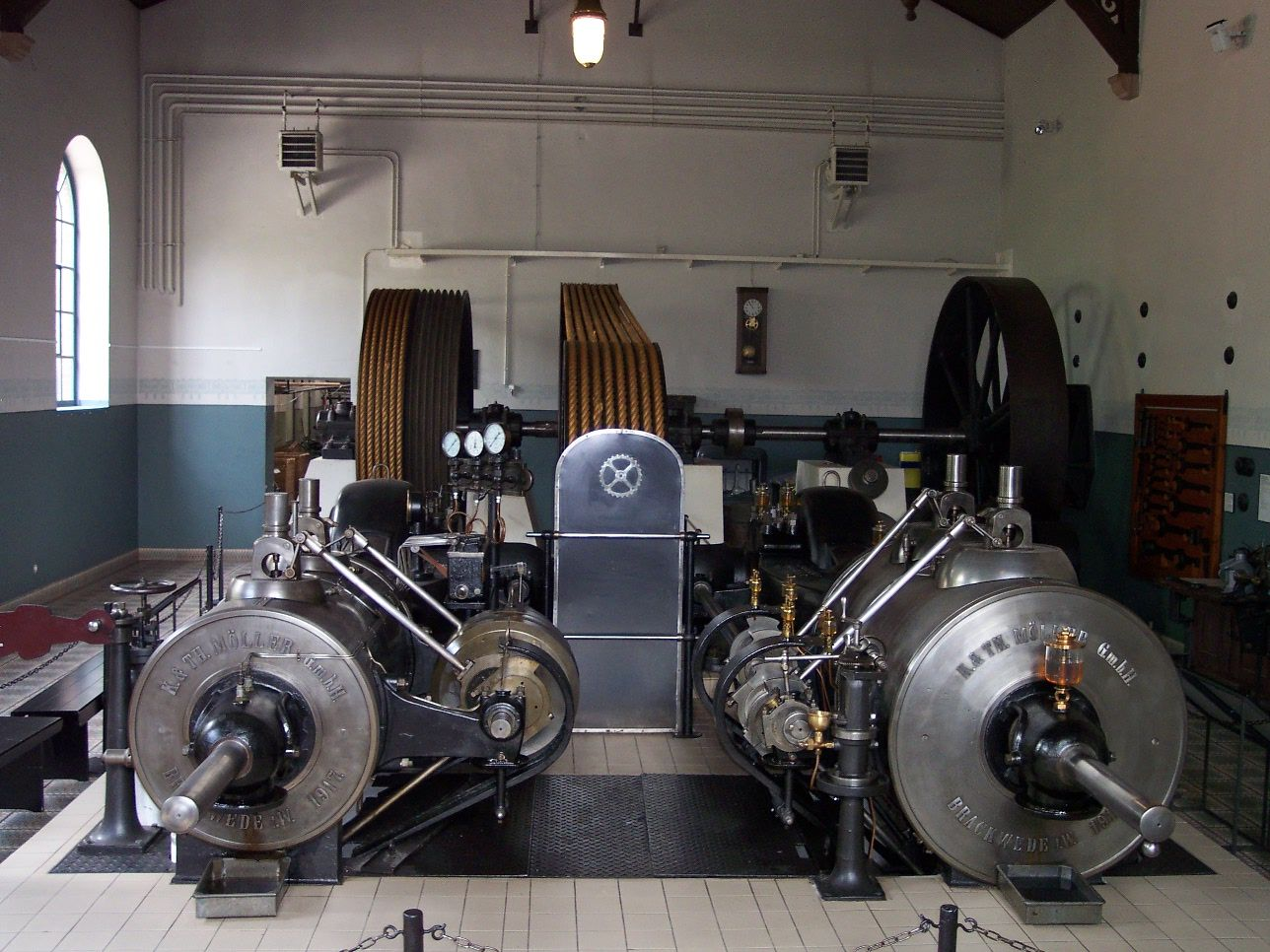 Dampfmaschine